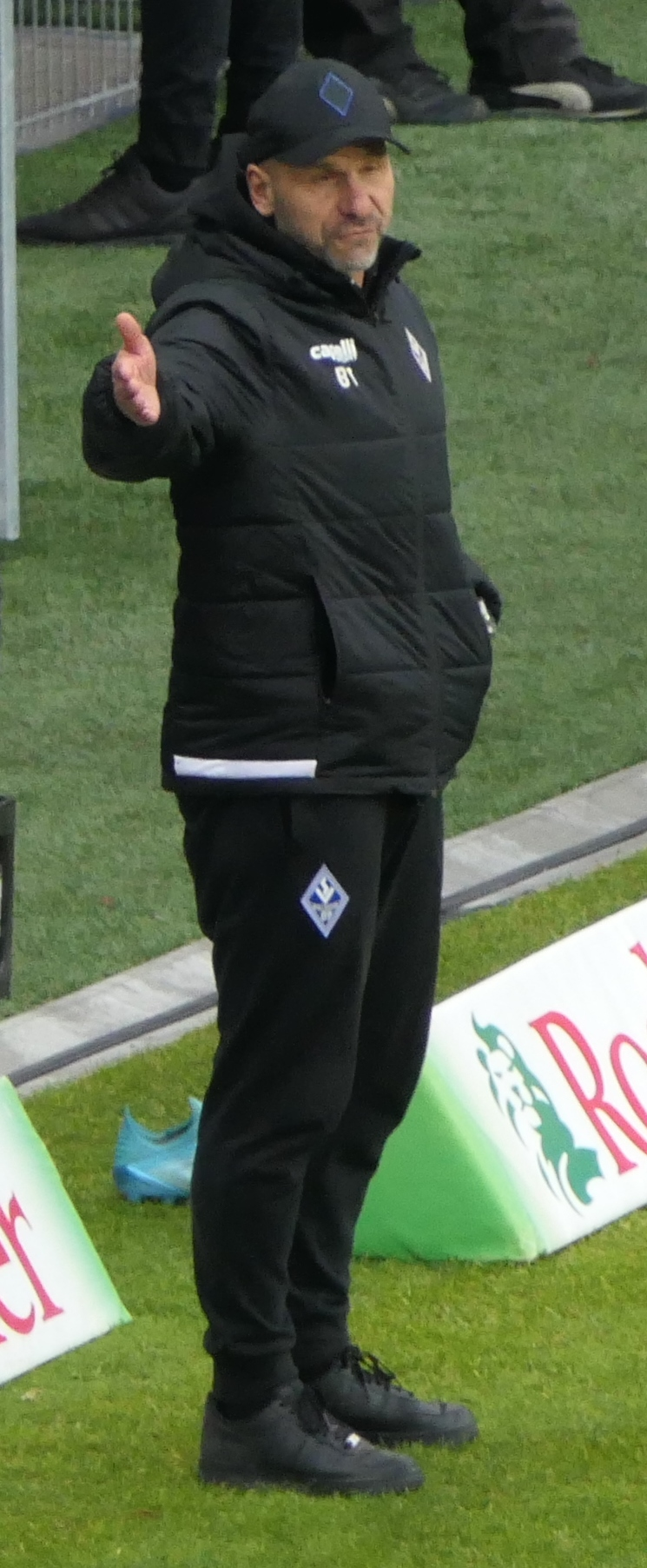 Der Fussballtrainer Bernhard Trares an der Seitenlinie vom SV Waldhof Mannheim beim Heimspiel gegen Eintracht Braunschweig am 08.12.2019.